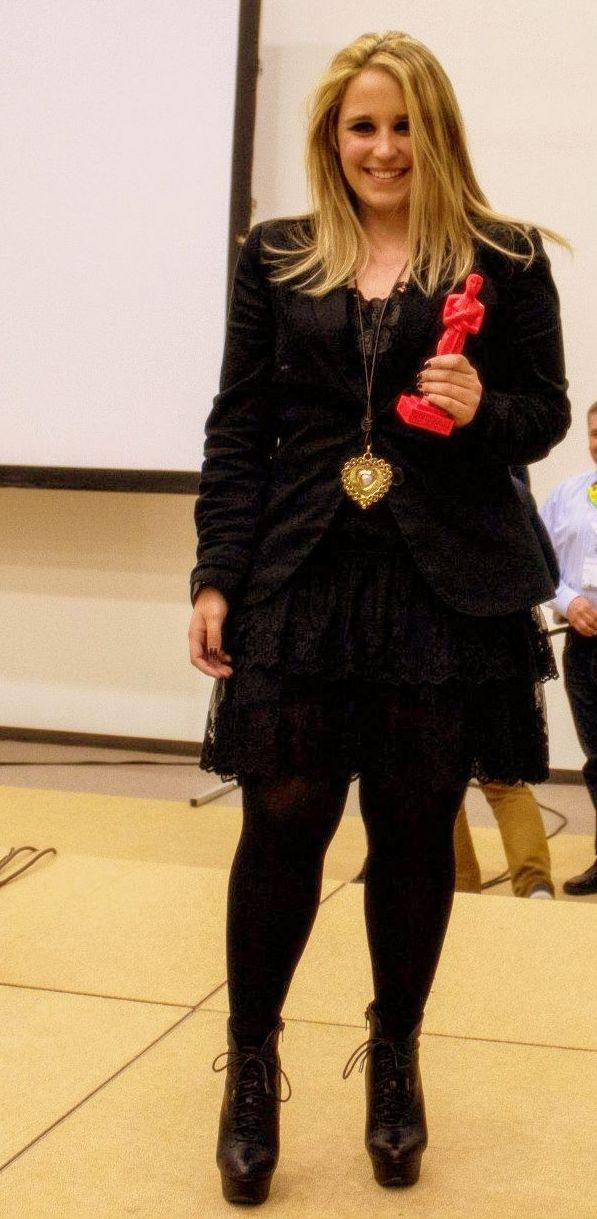 Carla Herrero recogiendo un galardón en los premios de Fundación Telefónica.